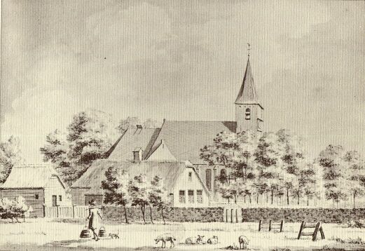 Gravure van Kudelstaart in de 17e eeuw. Geen auteursrechten ivm de ouderdom van het werk.